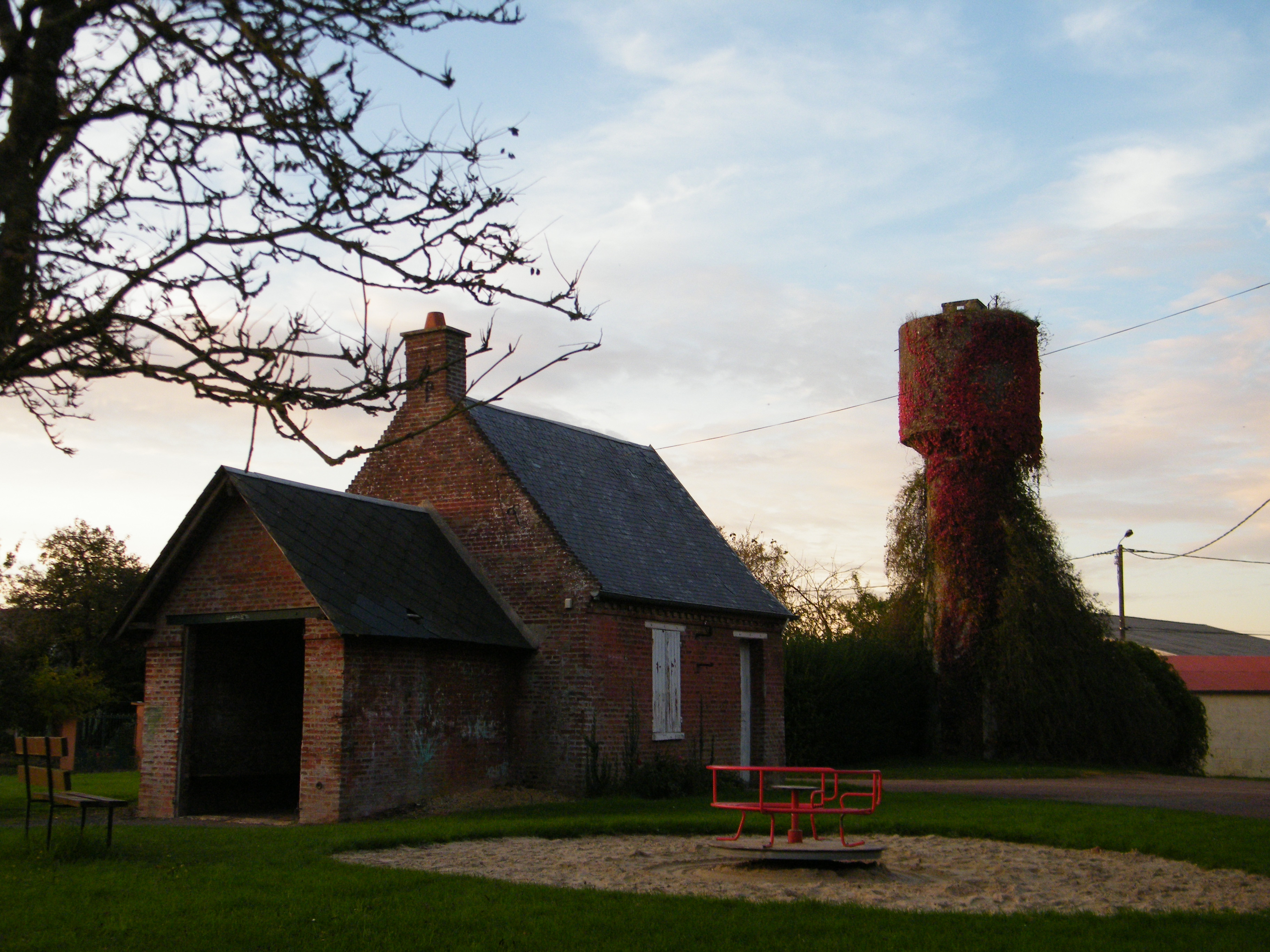 Abri communal, aire de jeux.